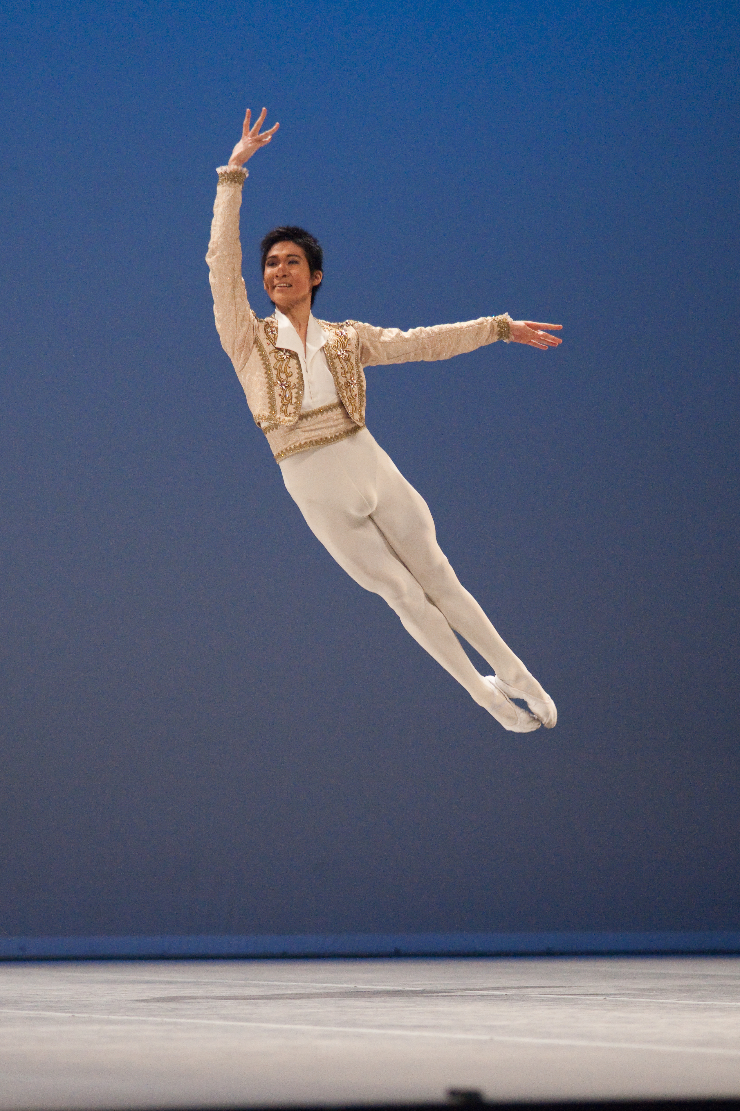 Variation extraite de Don Quichotte au Prix de Lausanne 2010. The making of this document was supported by Wikimedia CH. (Submit your project!) For all the files concerned, please see the category Supported by Wikimedia CH.